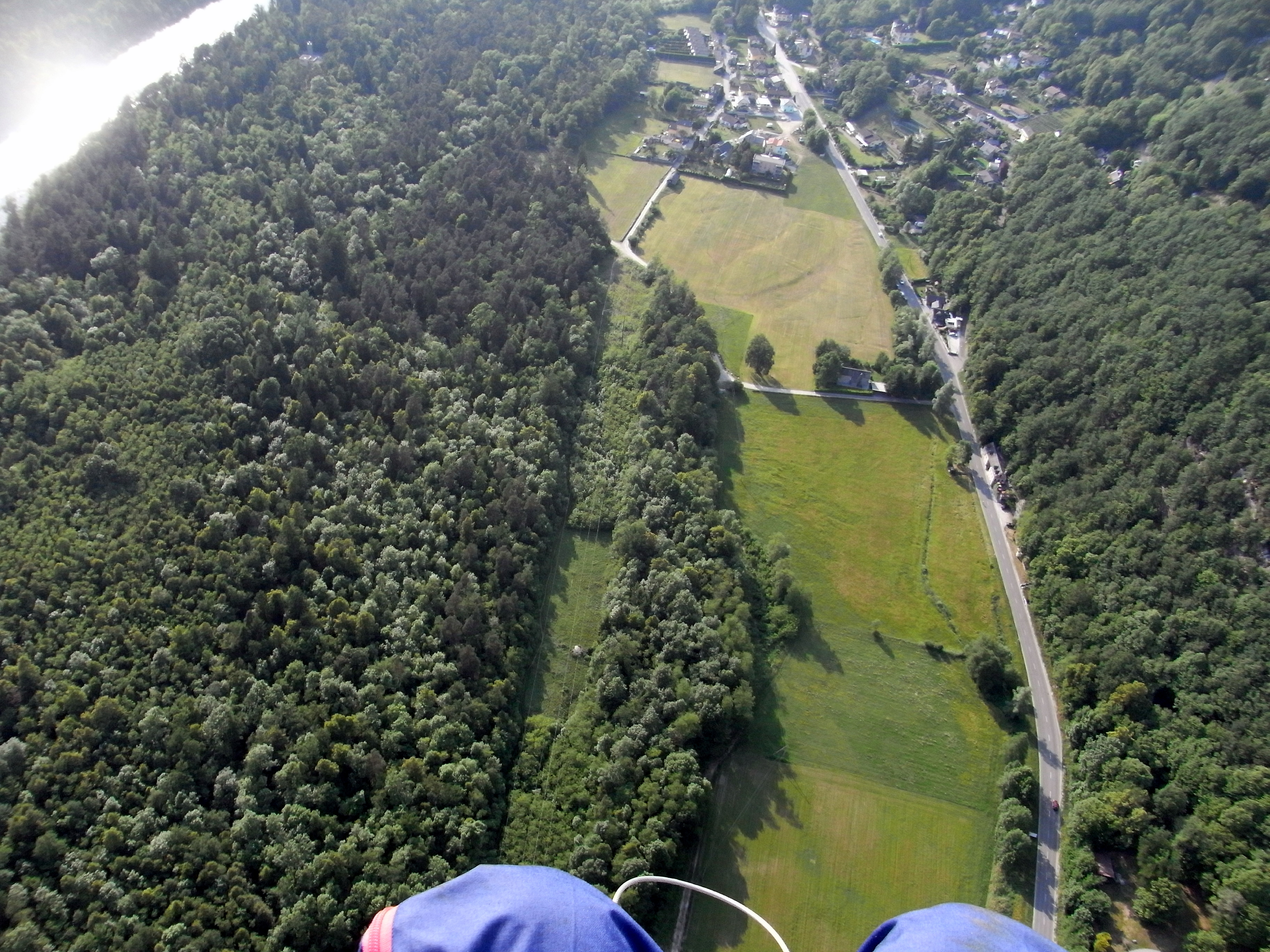 Ronchini